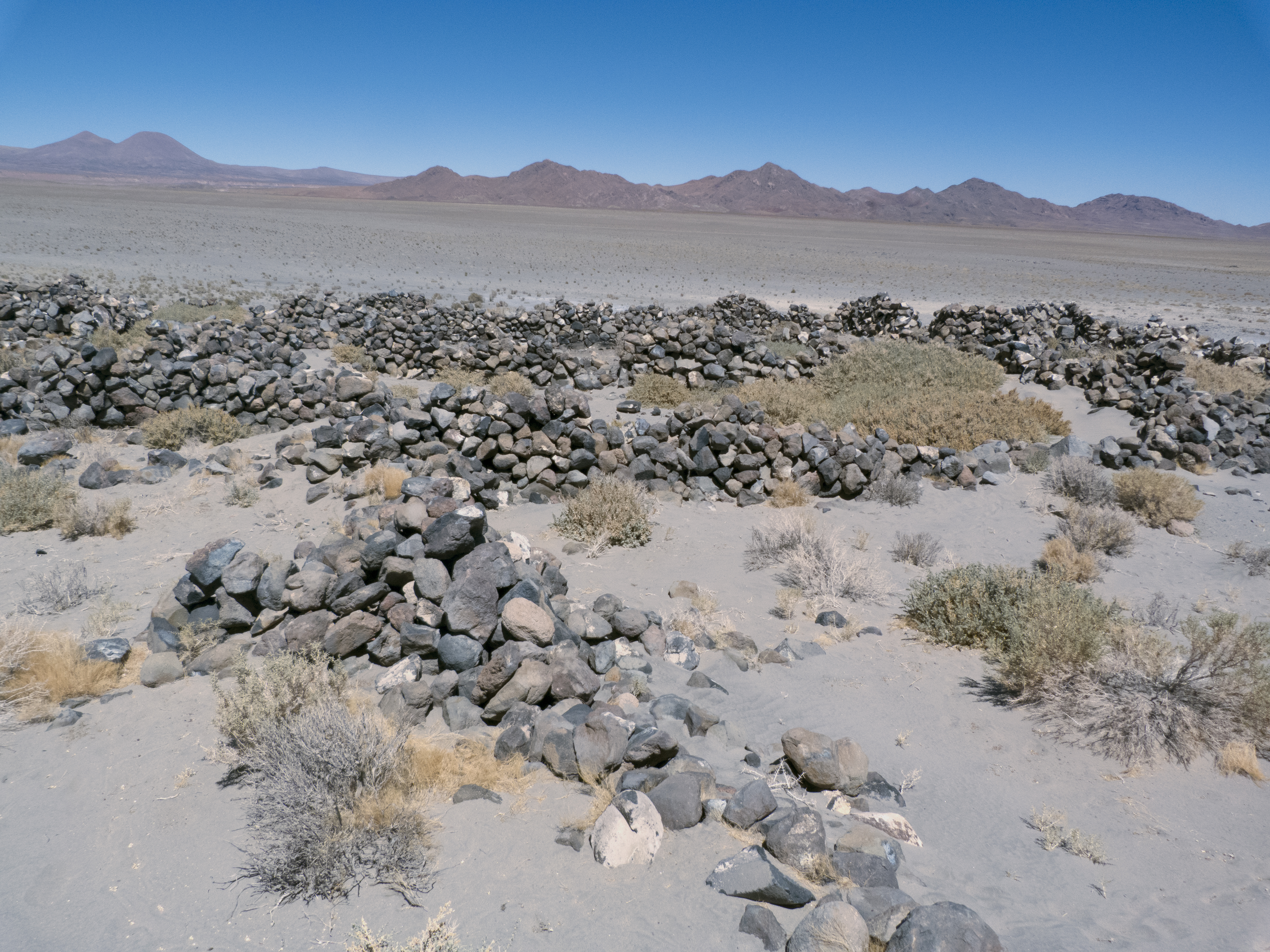 La vegetación y arena permiten distinguir las construcciones, que en otro caso, se mimetizan con el entorno This is a photo of a national monument in Chile: 549